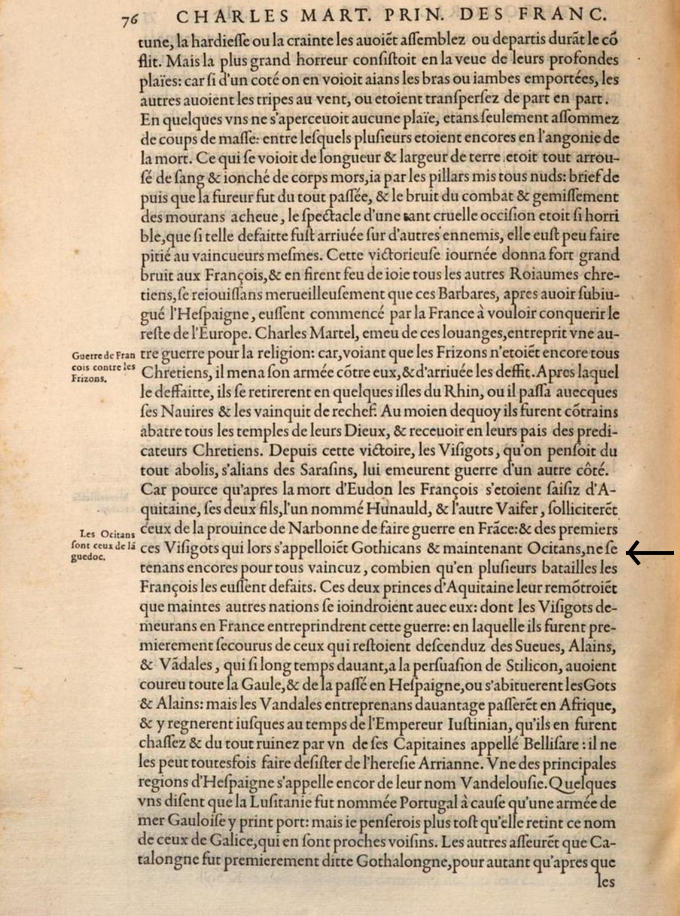 Extrach de Les cinq premiers liures de l'Hiſtoire Fraçoiſe, Traduits en françois du Latin de Paul AEmile, par Ian Regnart amb lo mot Ocitans (1556)